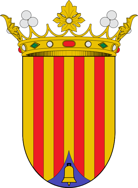 Escudo de Alfafar